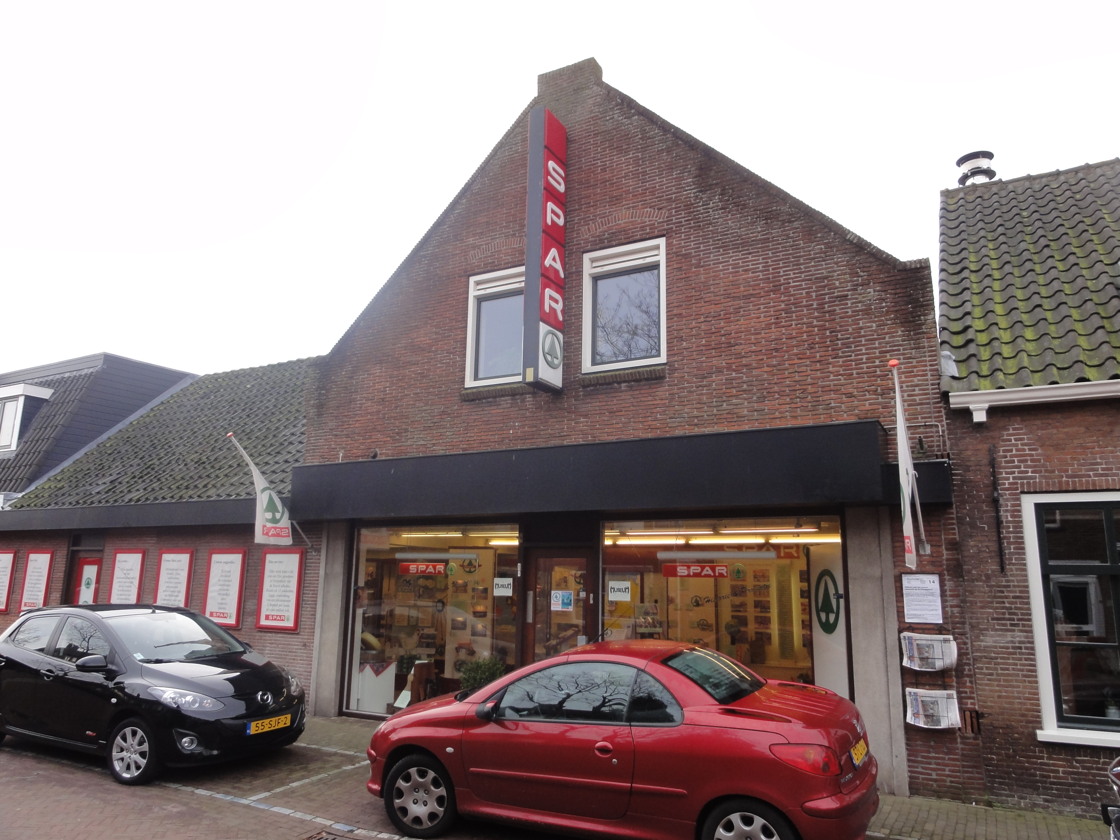 Sparmuseum aan de Hoofdstraat te Leiderdorp